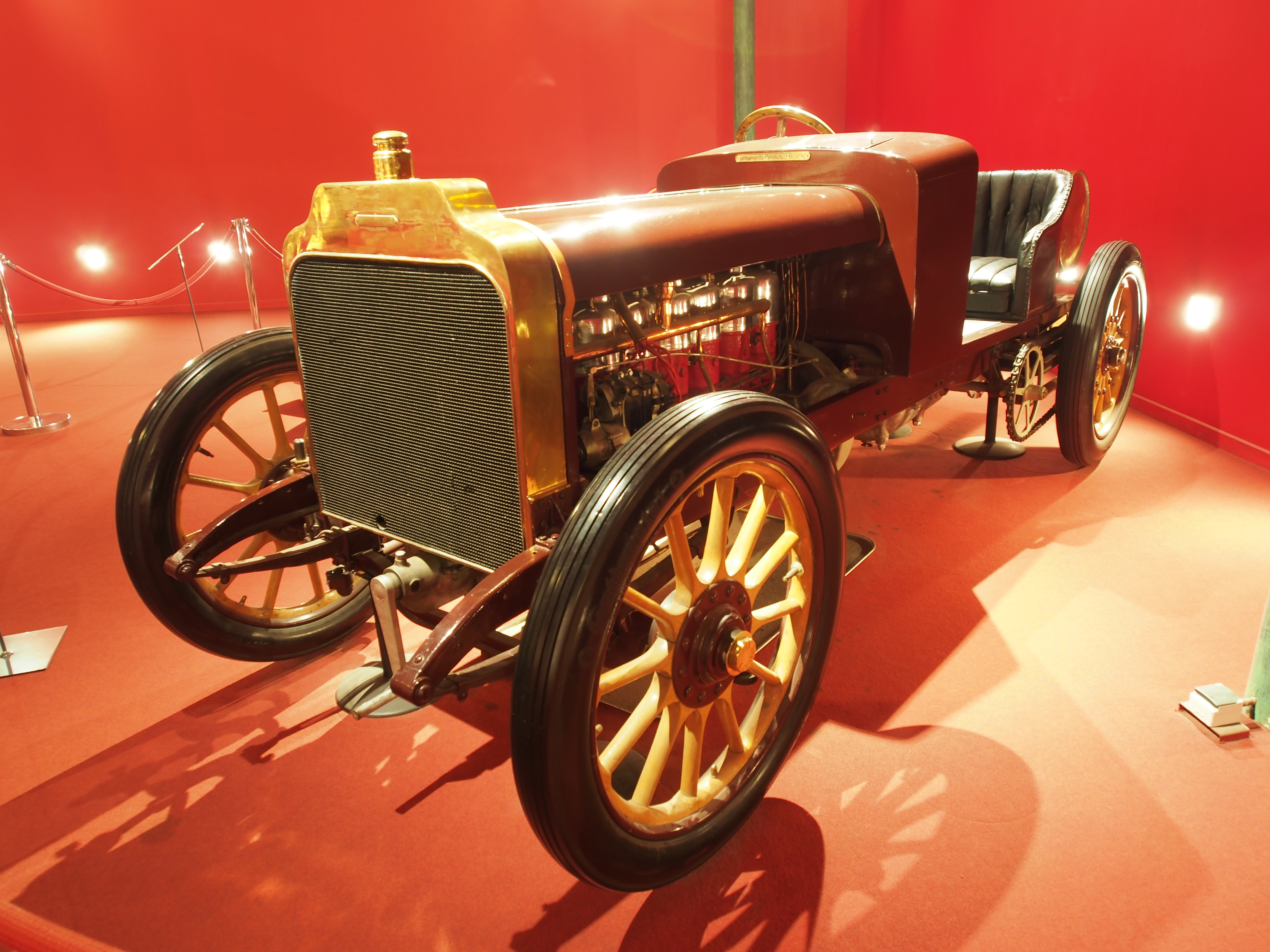 Photographed at the Cité de l’Automobile, Musée national de l’automobile, Collection Schlumpf, Mulhouse, France.